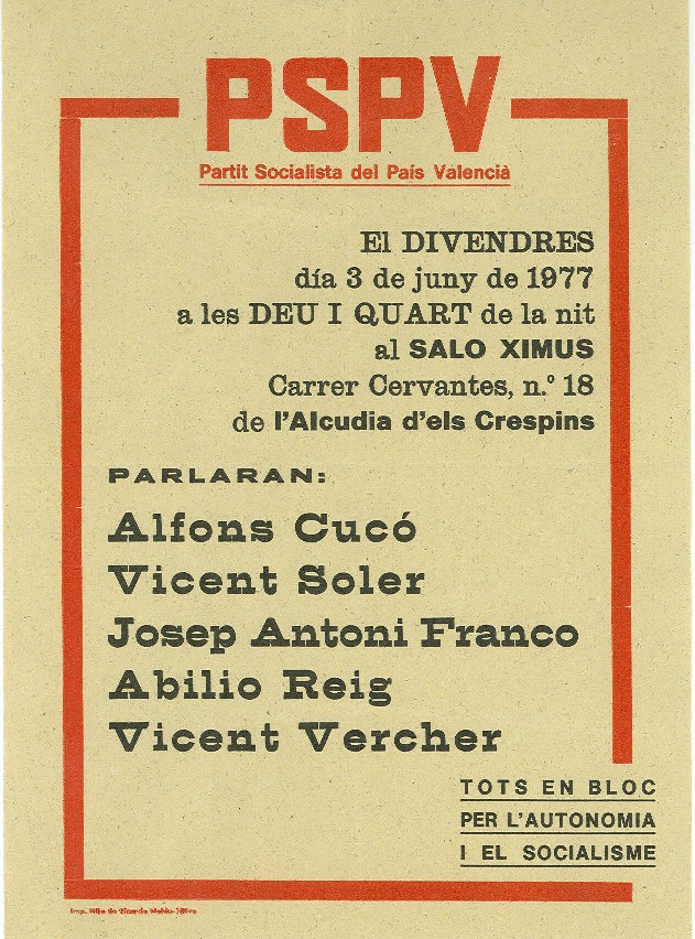 Cartell electoral del PSPV (abans de la absorció pel PSOE).